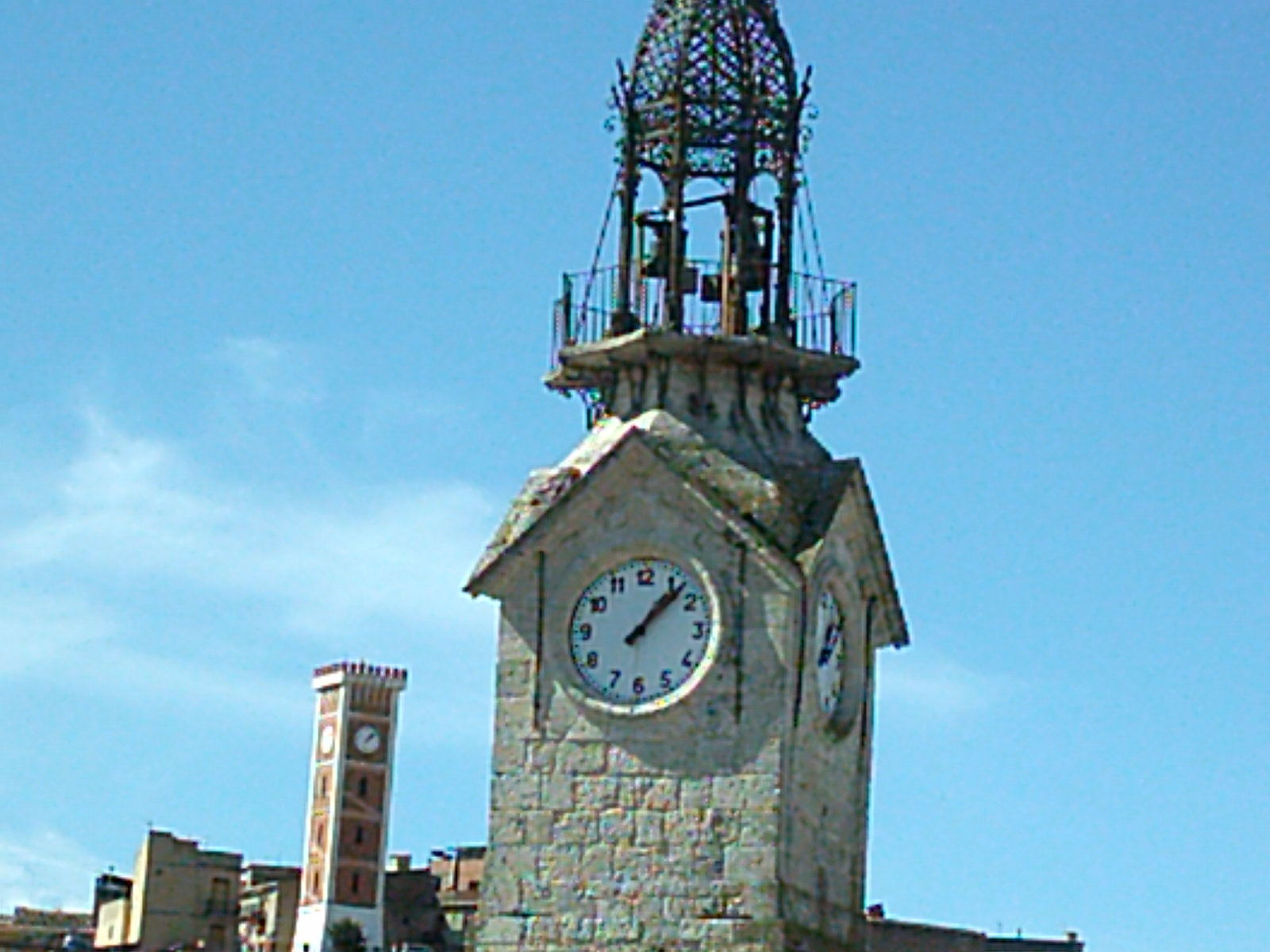 Suggestiva immagine delle due più importanti Torri civiche di San Cataldo